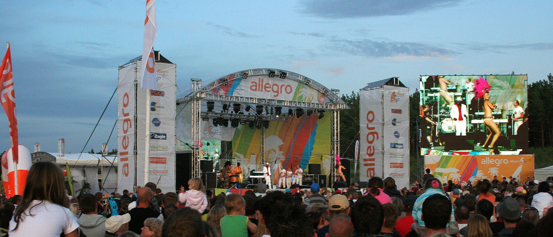 Koncert podczas Allegro Cup 2009.